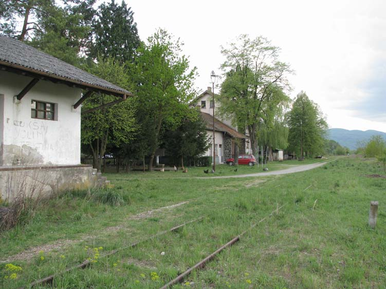 Željeznička stanica Vukovo Selo, Brdovec